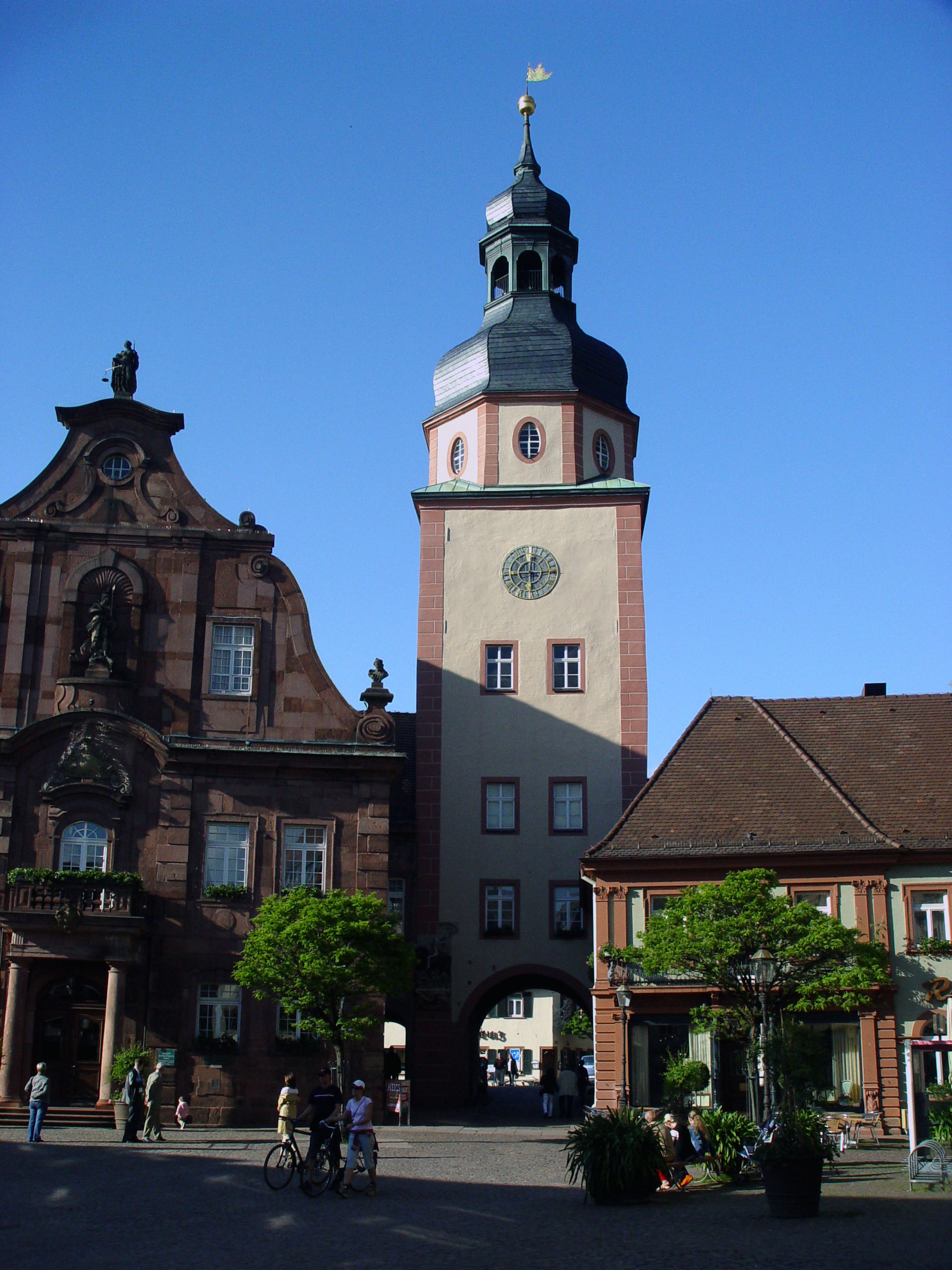 Rathausturm in Ettlingen.